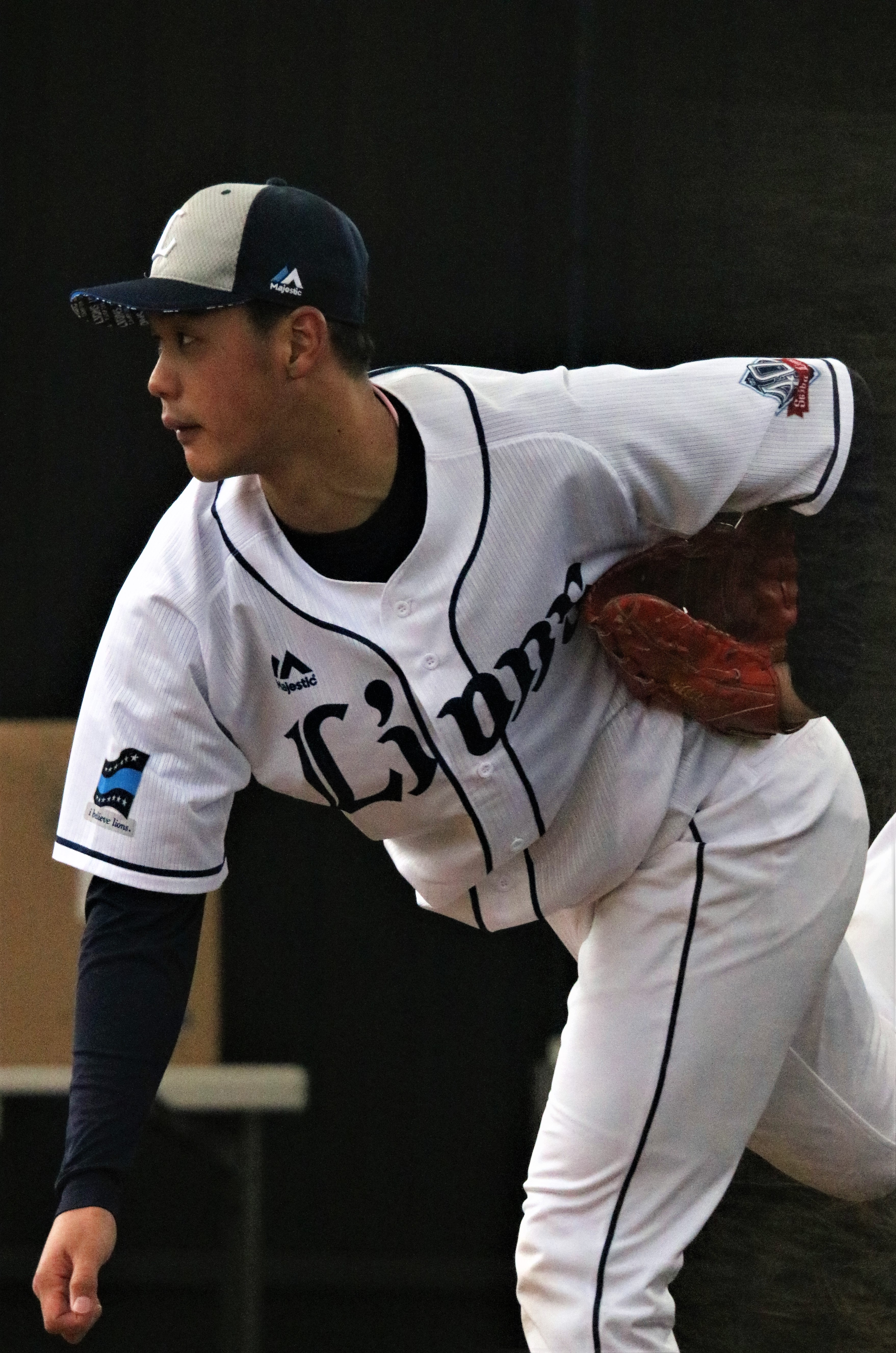 2018年2月9日春季キャンプ